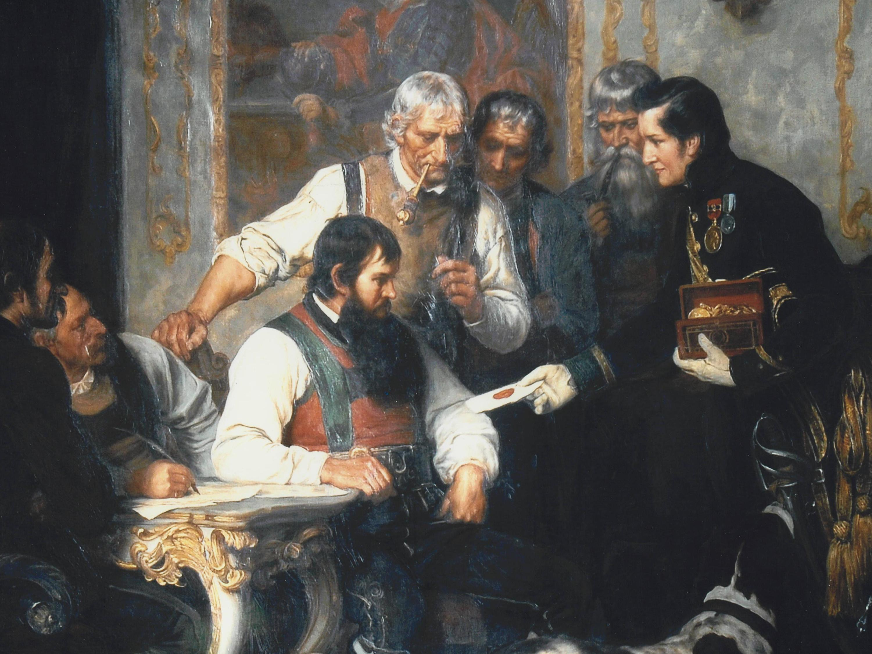 Major Eisenstecken übergibt Andreas Hofer in der Hofburg die kaiserliche Auszeichnung, eine Goldmedailie mit Kette und 3000 Golddukaten. Kopie nach einem Gemälde von Franz Defregger, Ferdinandeum Innsbruck